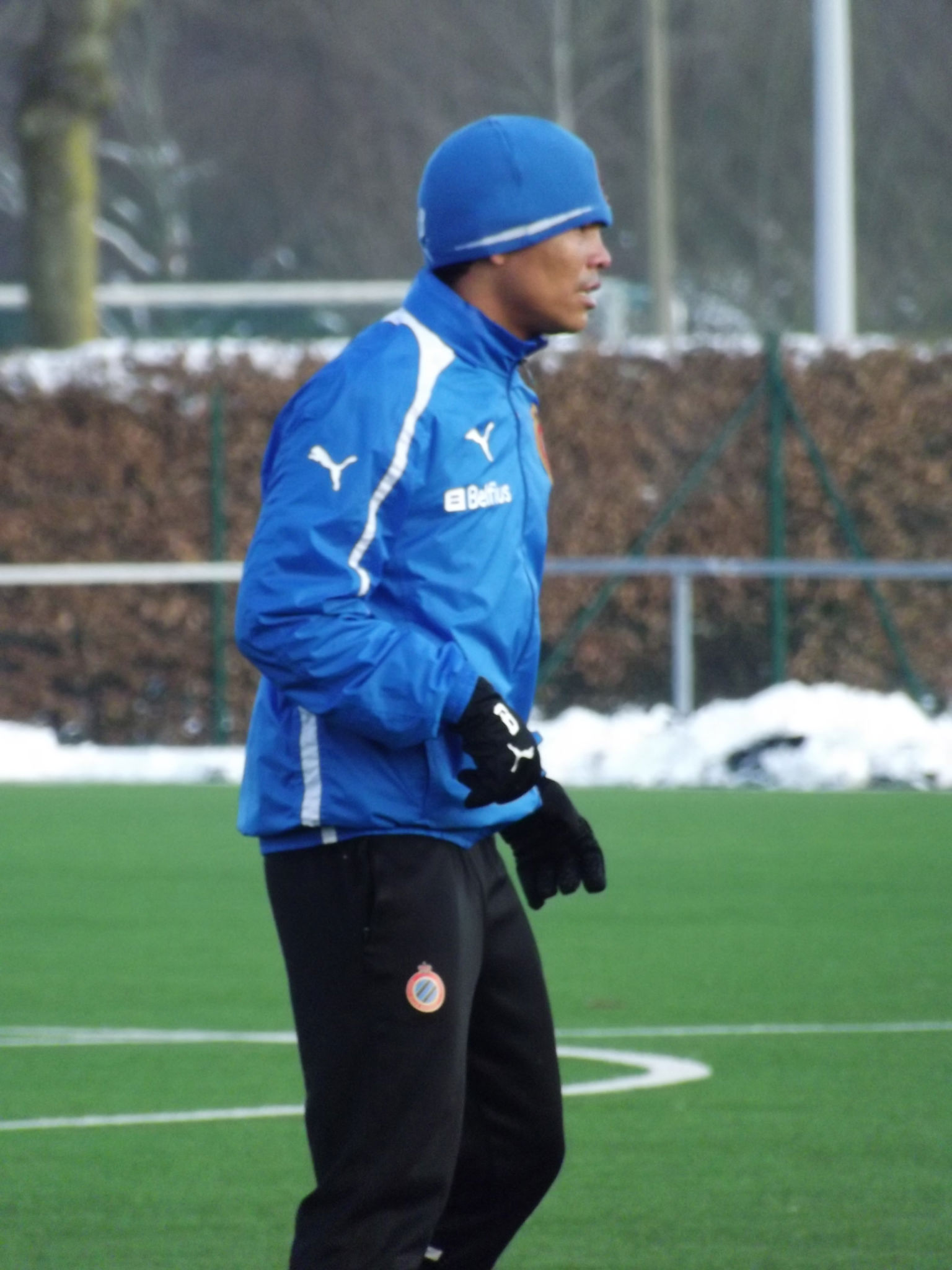 Carlos Bacca tijdens een veldtraining van Club Brugge op 16 januari 2013